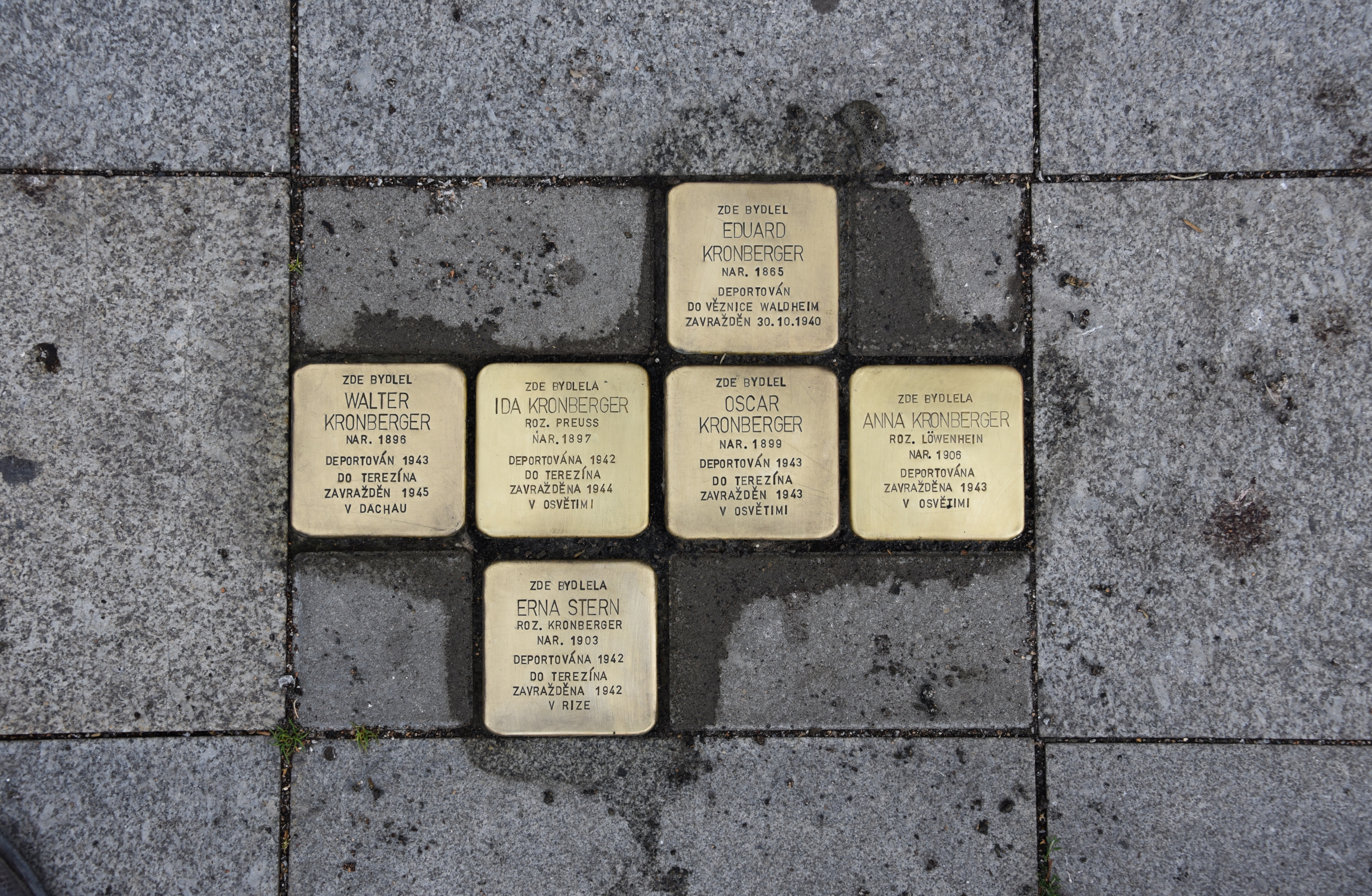 5 der Stolpersteine in Chodov